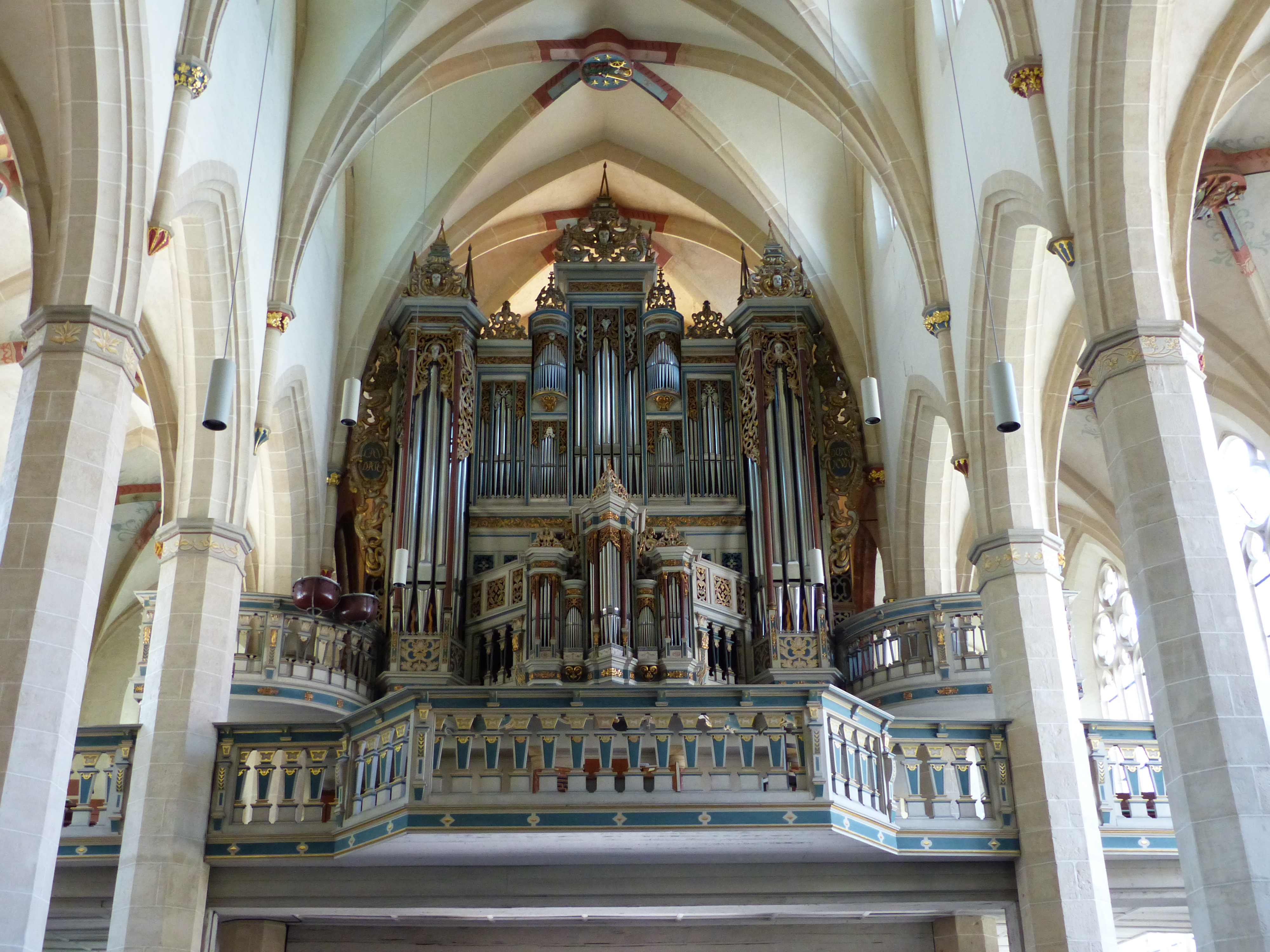 Predigerkirche Erfurt